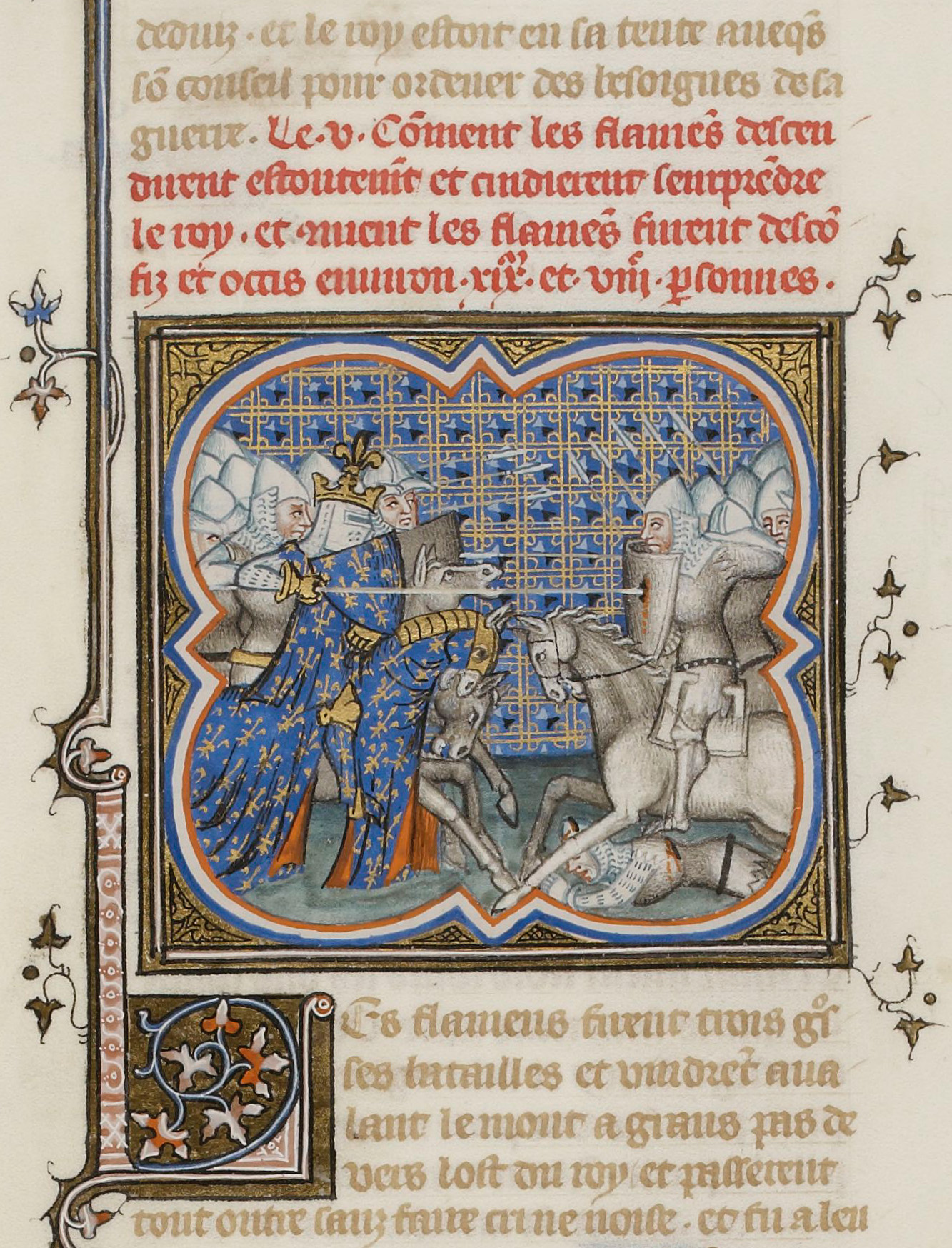 Bataille de Cassel (1328). Enluminure des Grandes Chroniques de France, XIVe siècle. Paris, Bibliothèque nationale de France, Département des manuscrits, Français 2813, folio 355 verso.